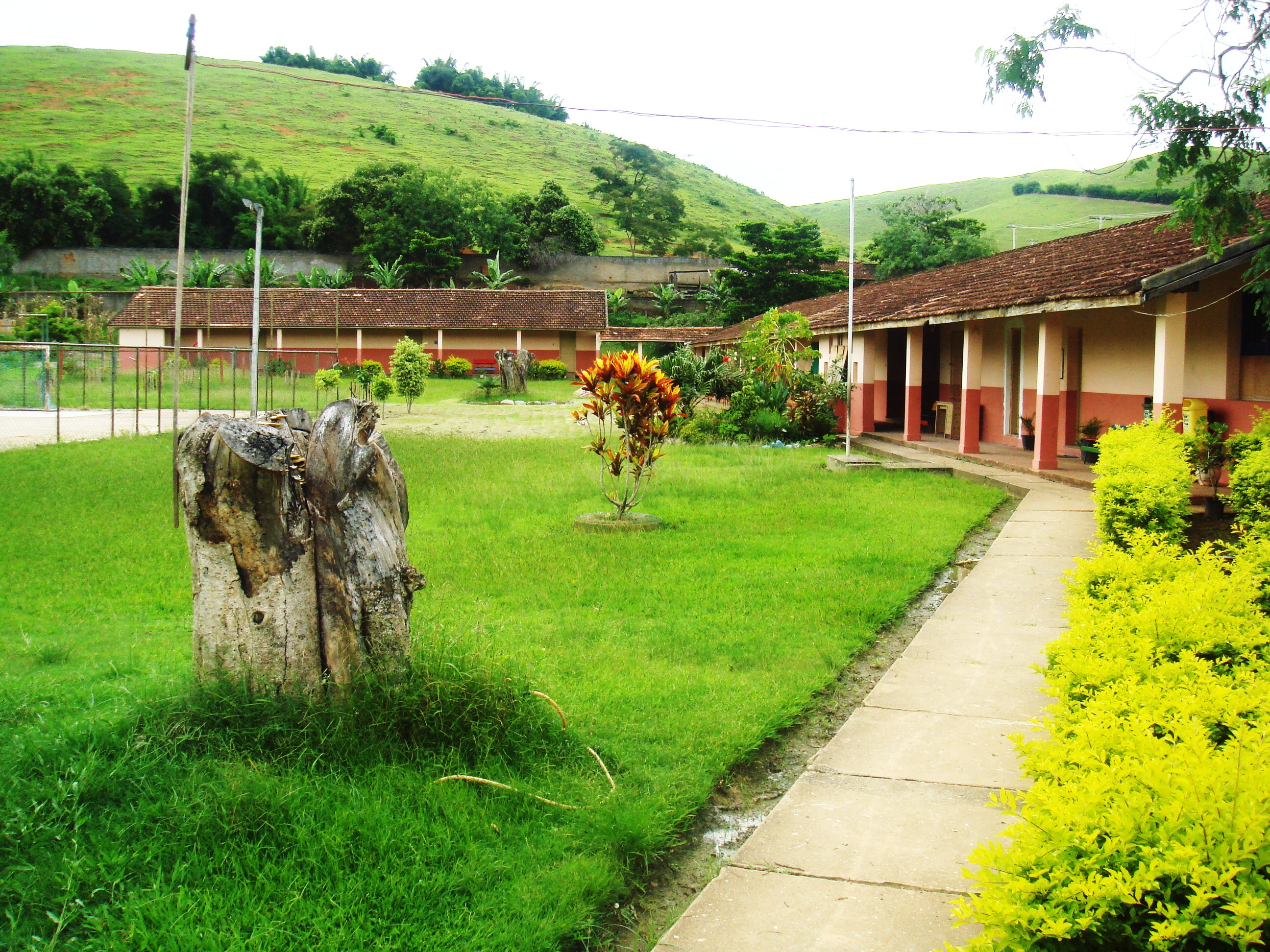 E.E. Lara Vilela, a principal de todo o distrito